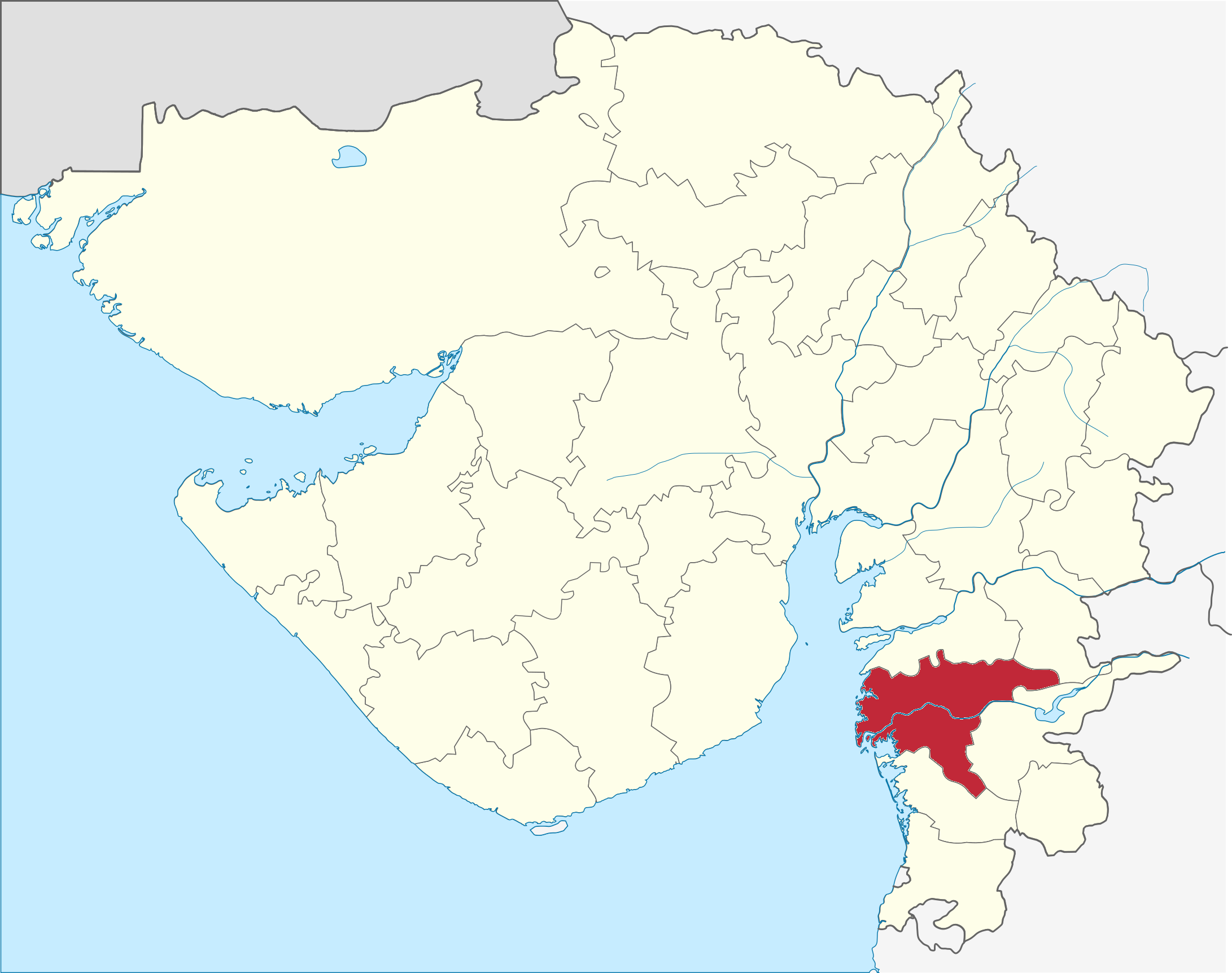 Distrito de Surat en Gujarat